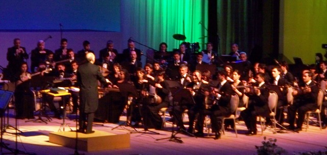 Азербайджанский государственный оркестр народных инструментов